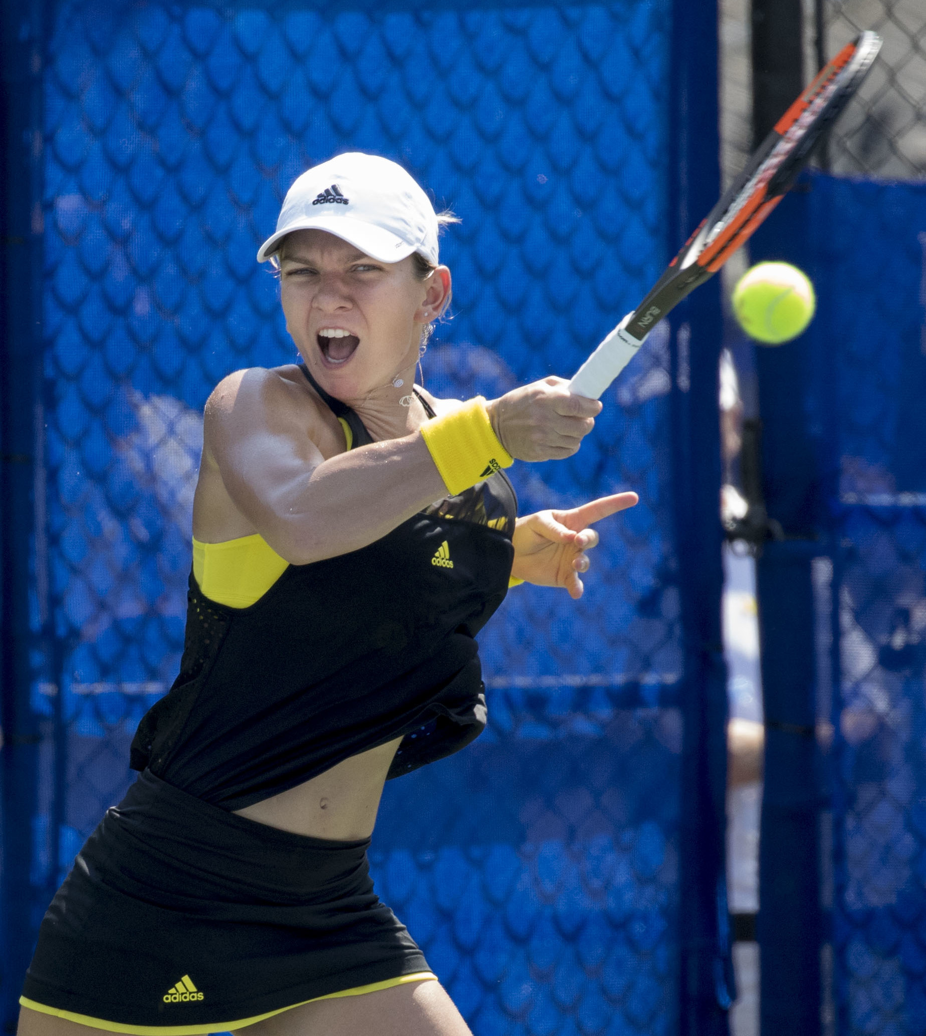 Citi Open Tennis 2017